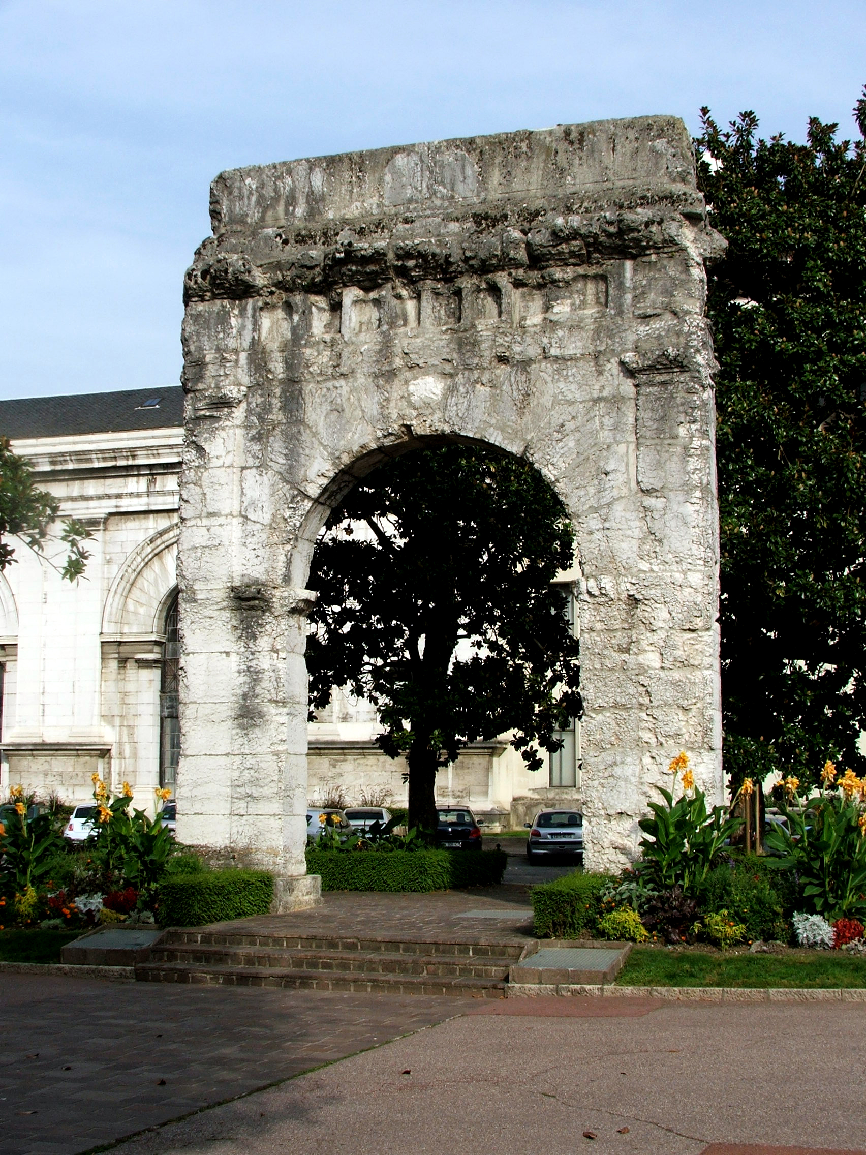 Arc de Campanus, à Aix-les-Bains en Savoie, photographié en 2011 ; érigé au Ier siècle siècle après J.-C. en l'honneur de la famille Campanii. .